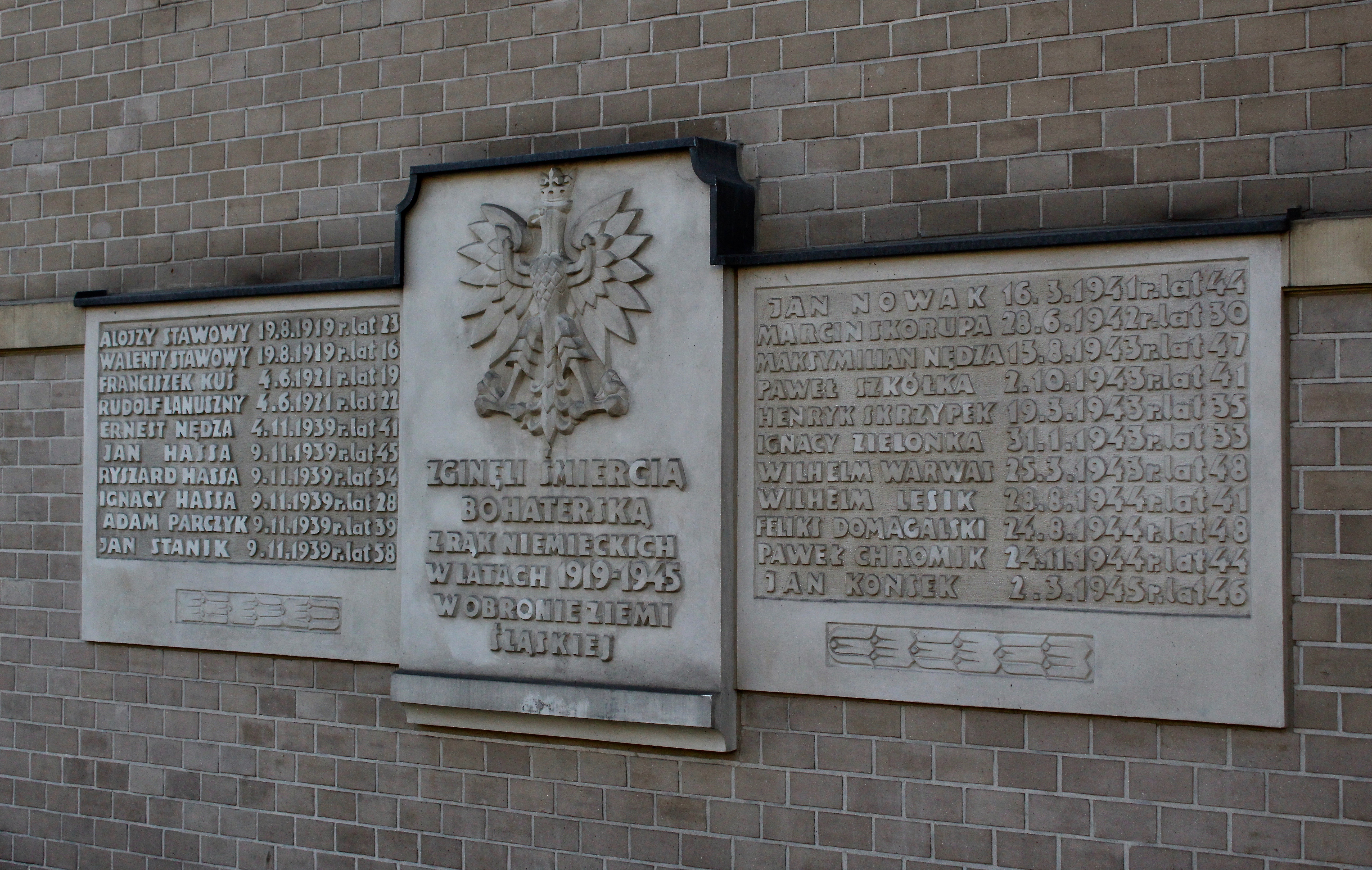 Tablica upamiętniająca na budynku Uniwersytetu Ekonomicznego w Katowicach